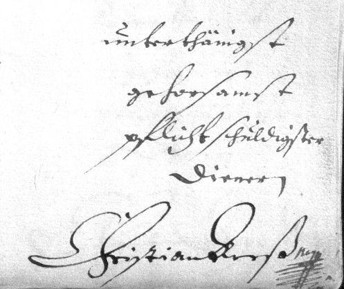 Christian Kreß: Eigenhändige Unterschrift unter einen Bericht vom 2. Juni 1690 an den Sächsischen Kurfürsten, in dem er sich als Amtmann des Amts Schwarzenberg für die Genehmigung eines Hausbaus in Schönheide im Erzgebirge verwendet. Der Textausschnitt lautet:" Unterthänigst /gehorsamst /pflichtschuldigster /Diener /Christian Kreß"